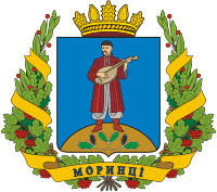 Герб Моринців